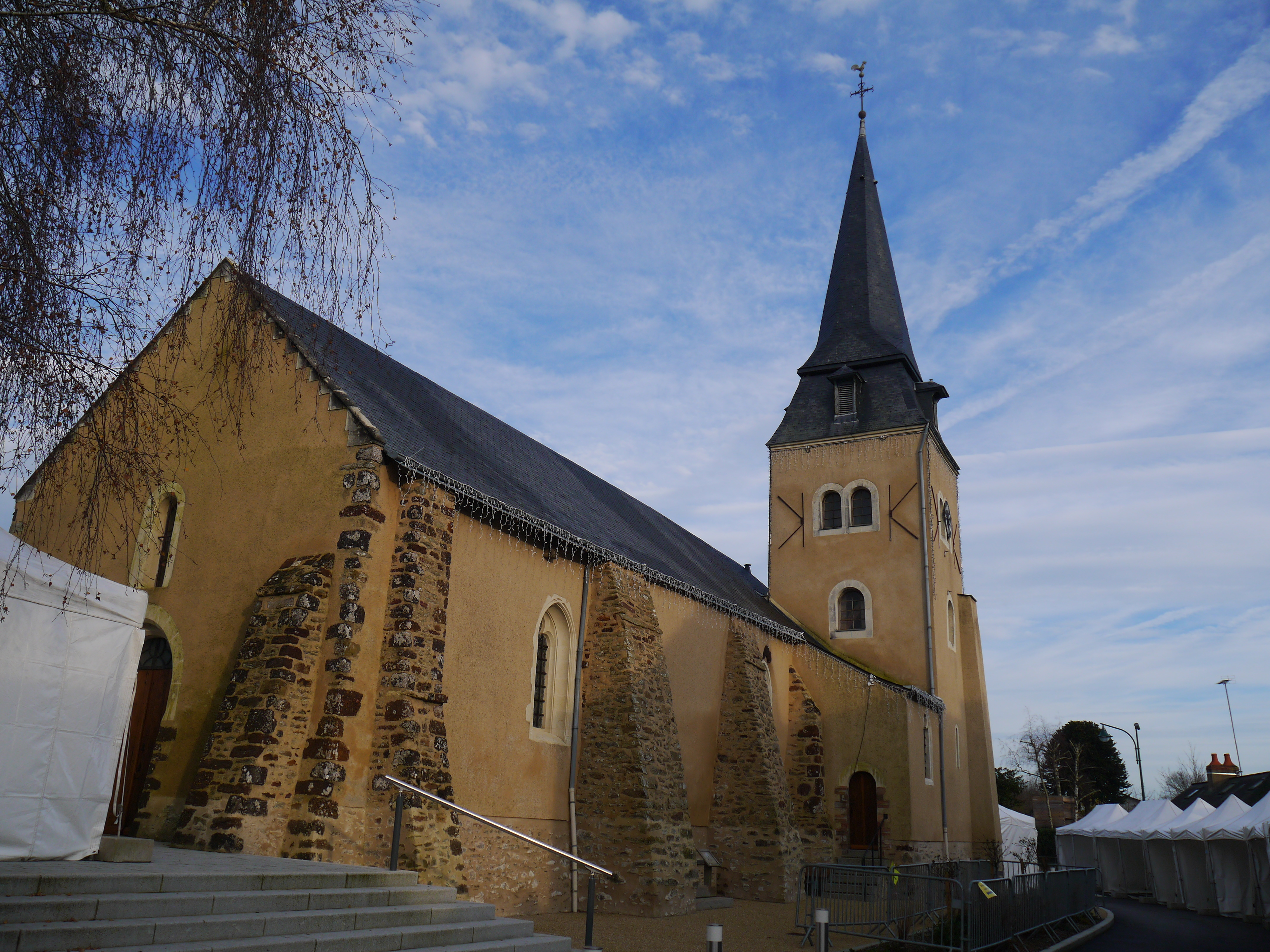 L'église Saint-Fort (on aperçoit les barnums du marché de Noël 2015..!)